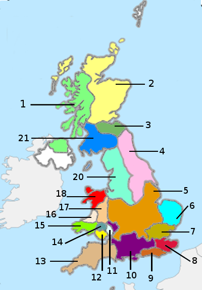 Els regnes de l'època de Cearl de Mèrcia:1-Dál Riata, 2-Regne dels pictes, 3-Goddodin, 4-Northúmbria, 5-Mèrcia, 6-Ànglia de l'Est, 7-Essex, 8-Kent, 9-Middlessex, 10-Wessex, 11-Gwent, 12-Glywising, 13-Dumnònia, 14-Brycheiniog, 15-Dyfed, 16-Ceredigion, 17-Powys, 18-Gwyned, 19-, 20-Rheged, 21-Strathclyde.